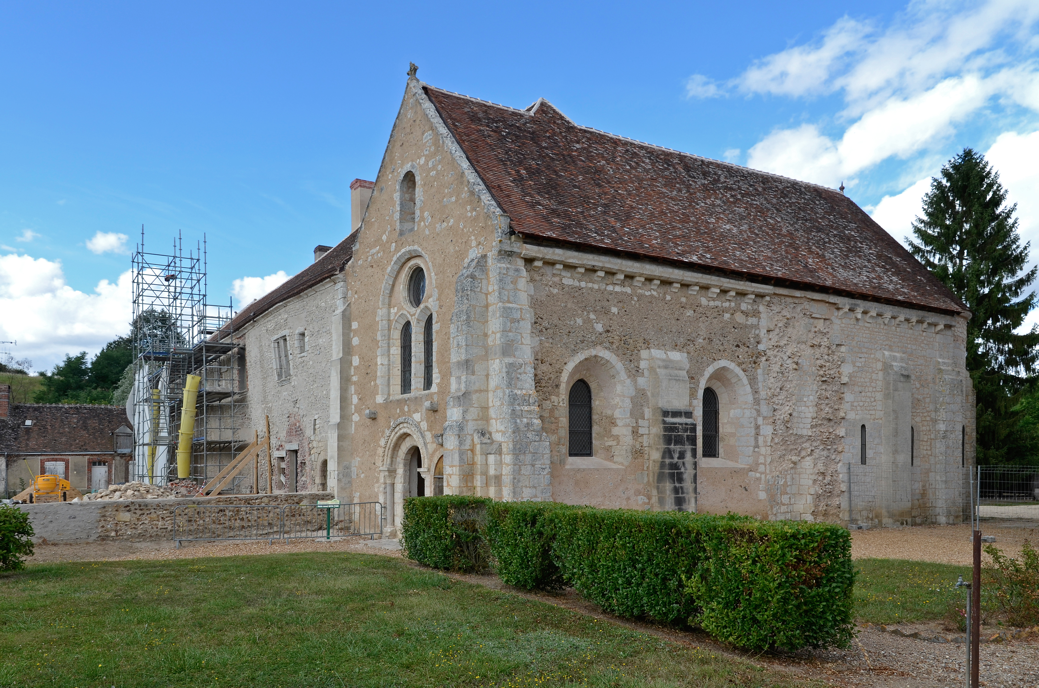 Chapelle du Prieuré de Notre-Dame d'Yron - Cloyes-sur-le-Loir, Eure-et-Loir .